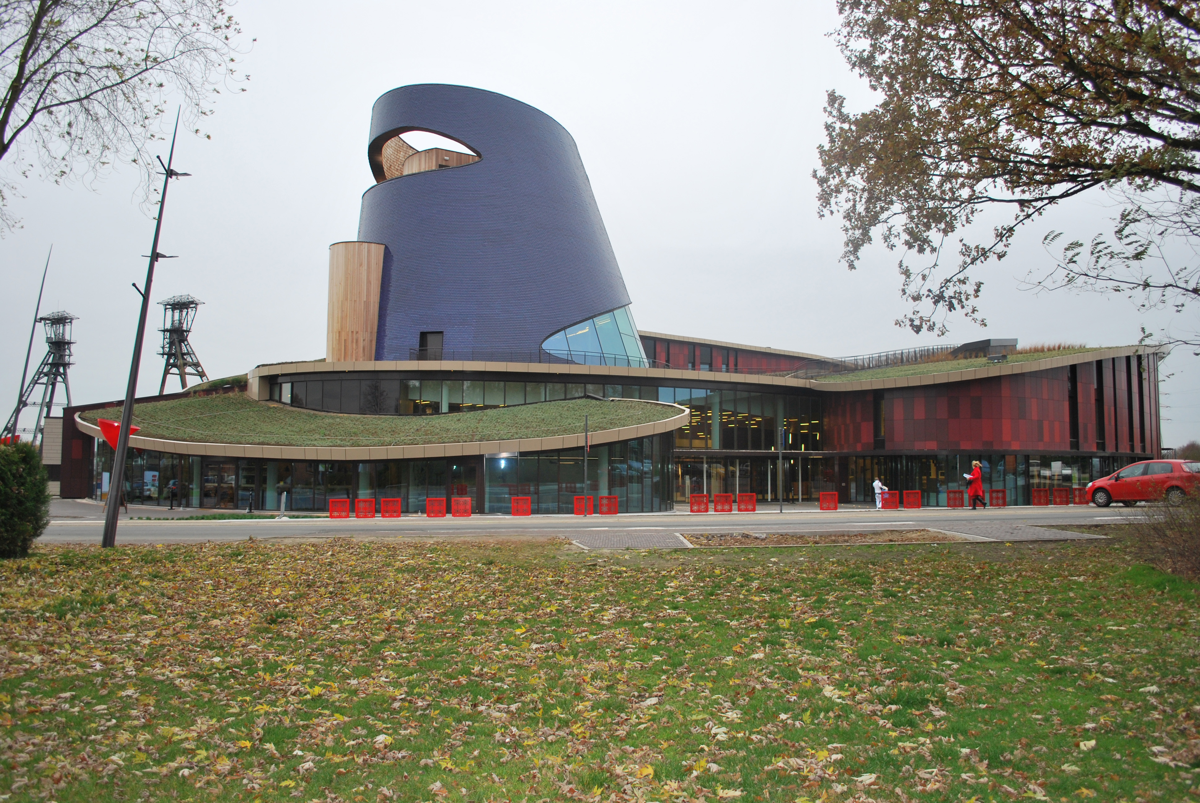 Nieuw Administratief Centrum in Houthalen-Helchteren dat diverse diensten huisvest.